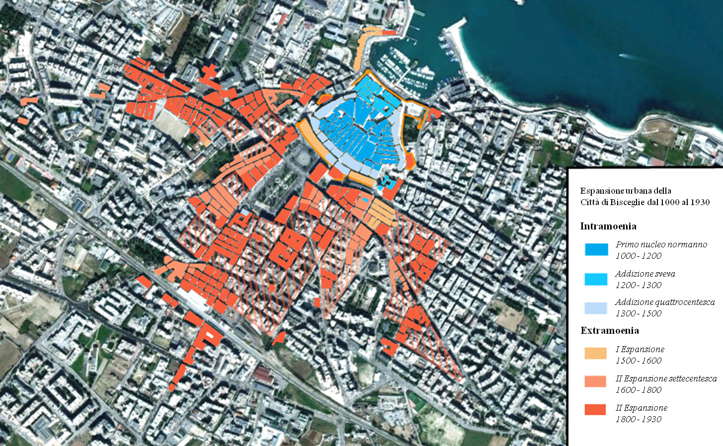 Sviluppo del tessuto urbano di Bisceglie